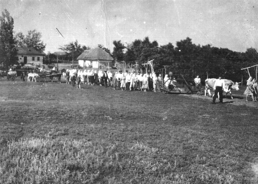 Перевірка готовності до жнив